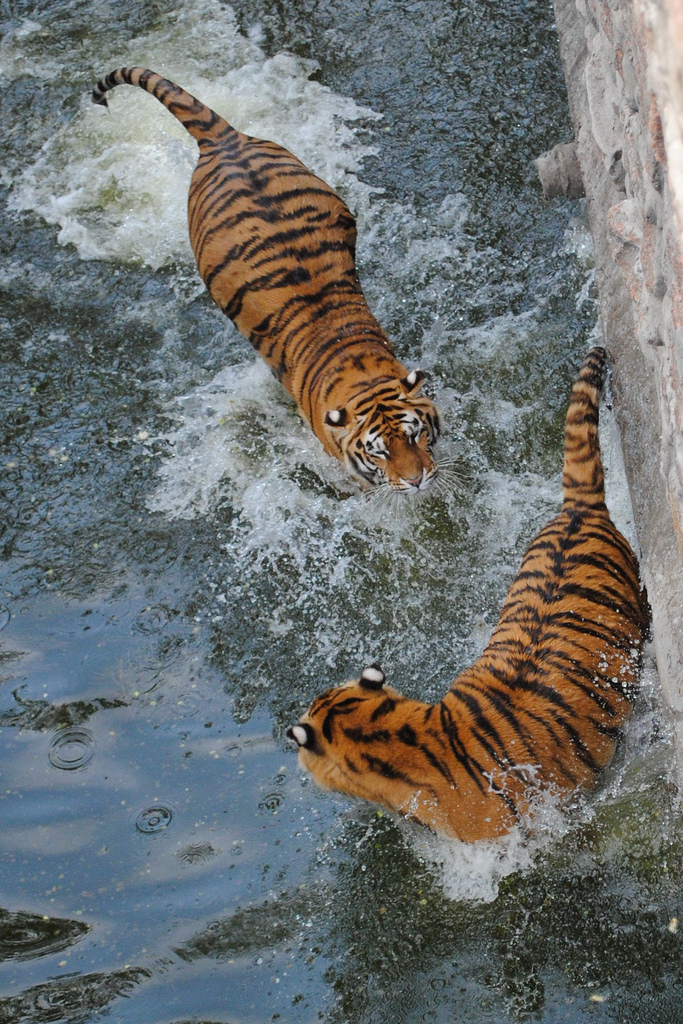 Tigre saltando en el agua